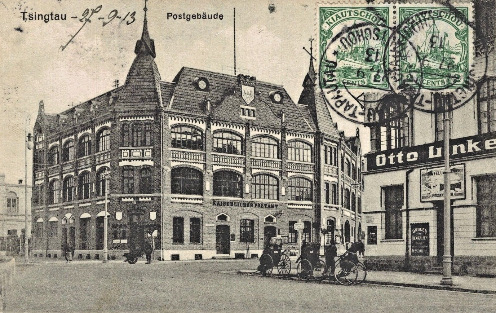 青岛胶澳皇家邮局旧明信片